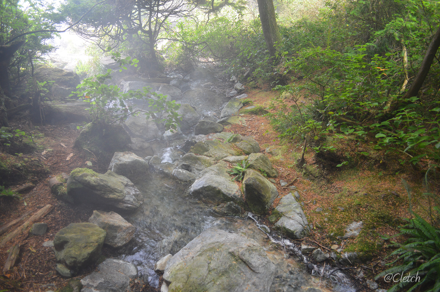 Maquinna Marine Provincial Park